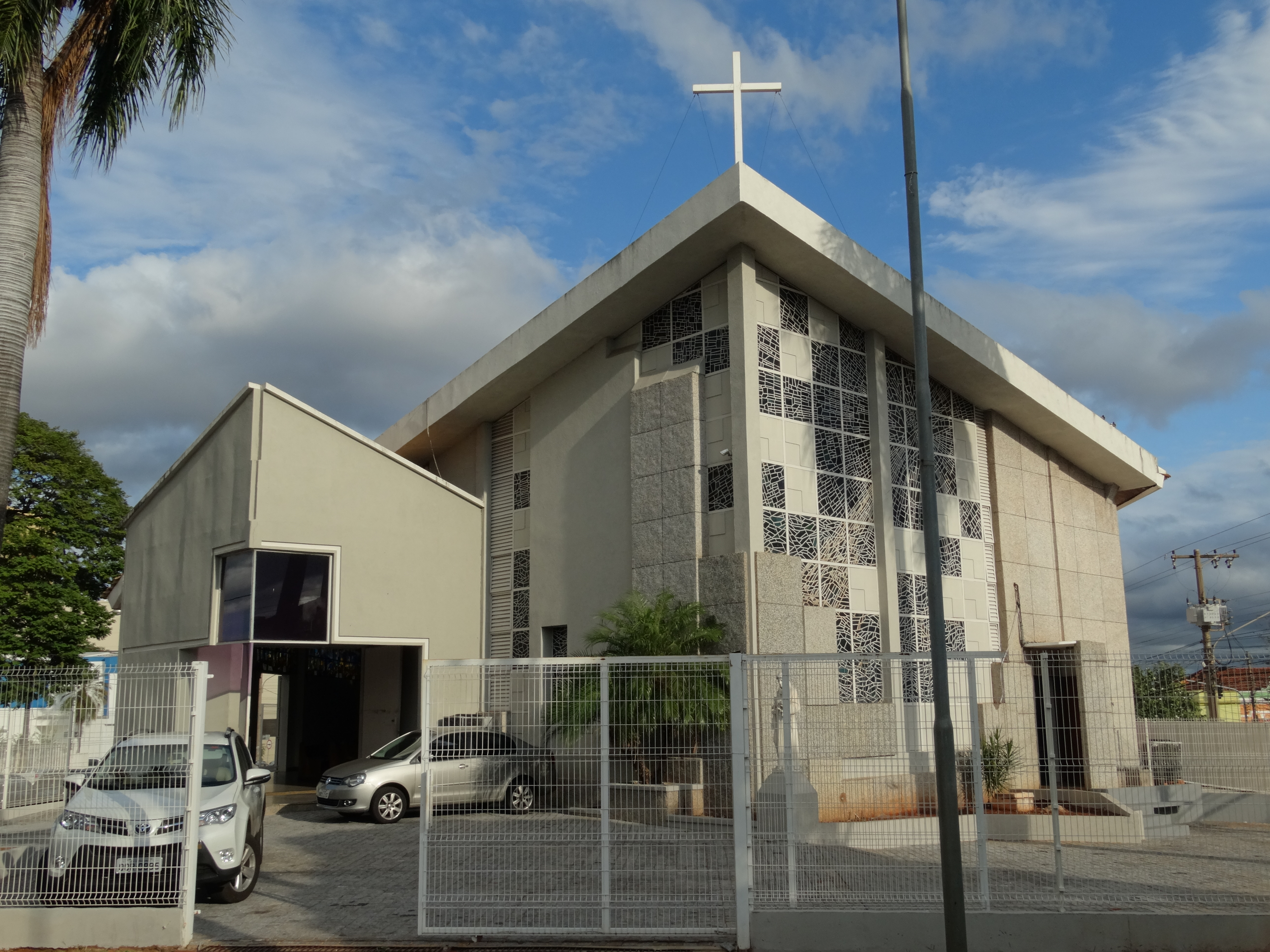 Catedral Metropolitana Nossa Senhora da Abadia e Santo Antônio